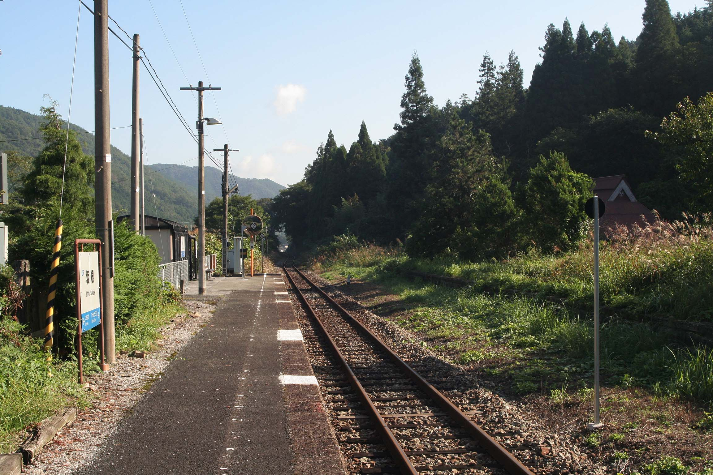 西日本旅客鉄道 坂根駅の構内